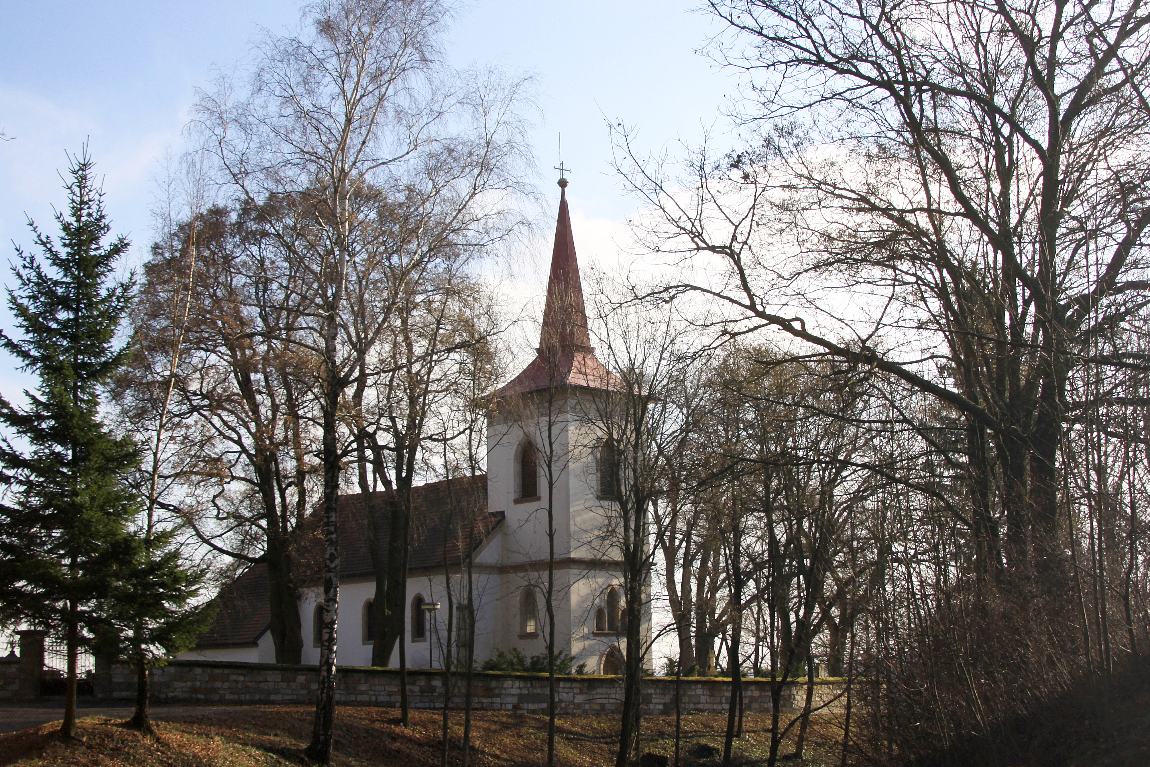 Kostel sv. Jakuba Většího (Červená Třemešná), na návrší na SZ okraji obce, Červená Třemešná